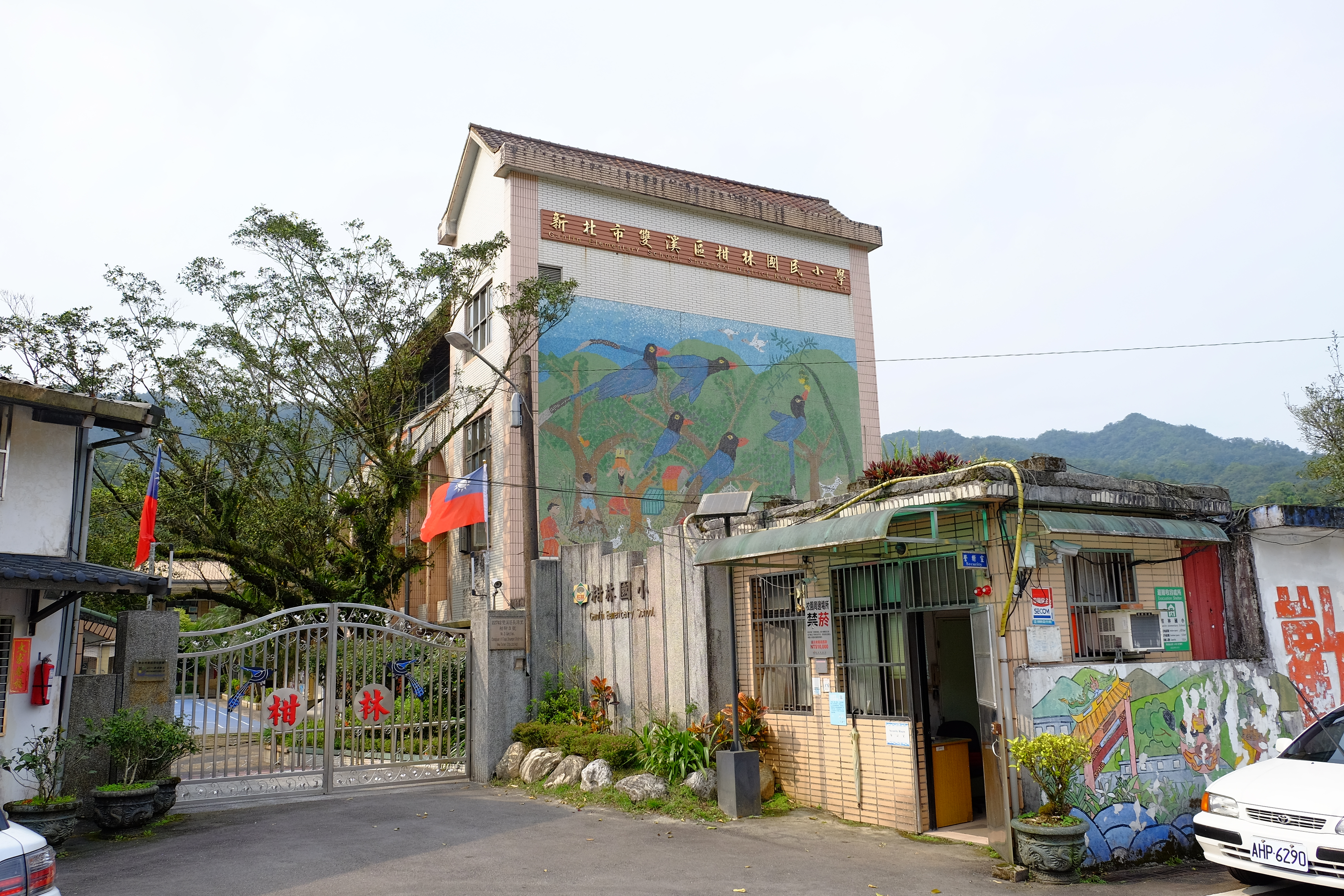 Ganlin Elementary School Shuangxi District